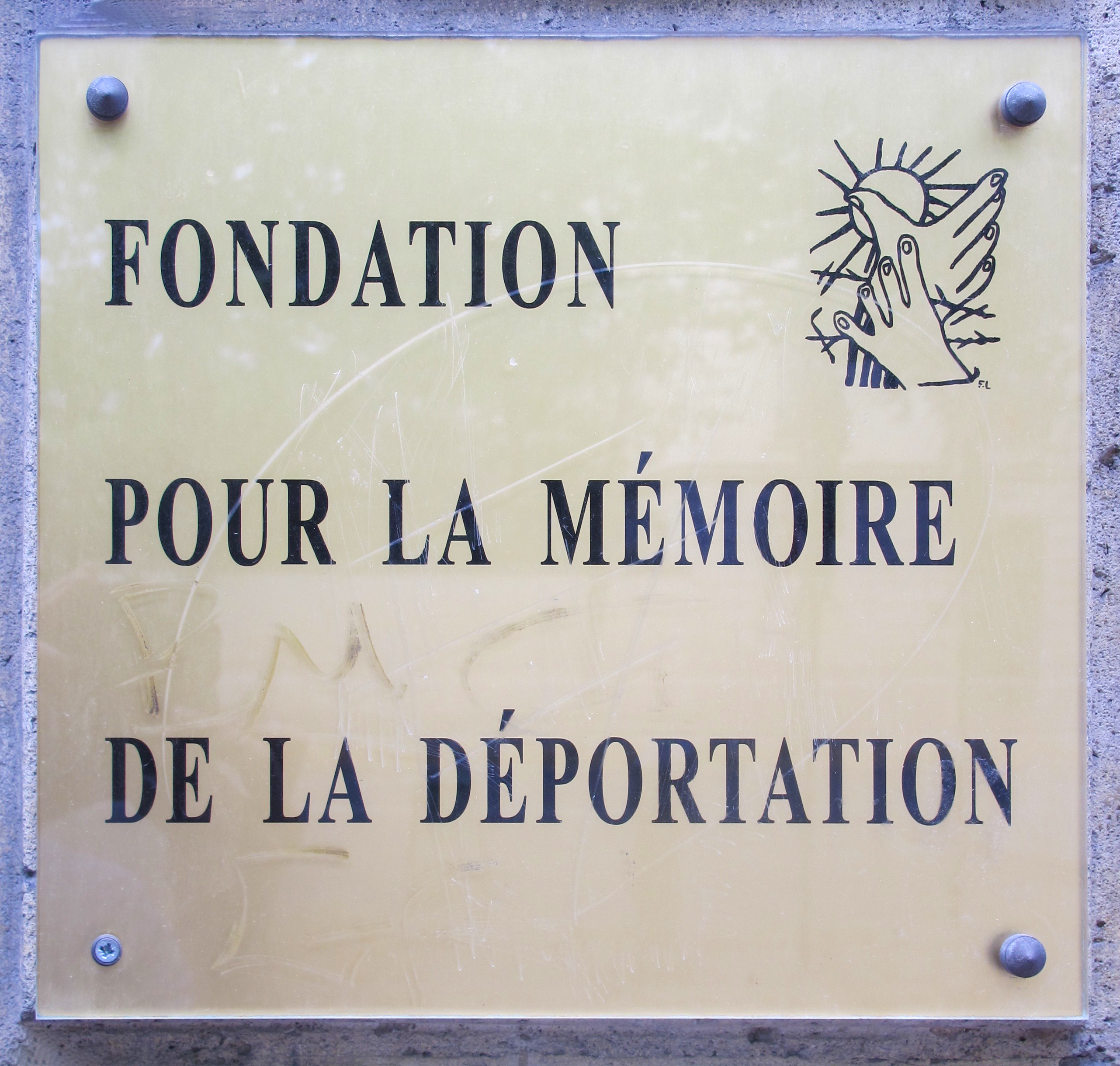 Plaque de la fondation pour la mémoire de la déportation, 30 boulevard des Invalides (Paris, 7e).